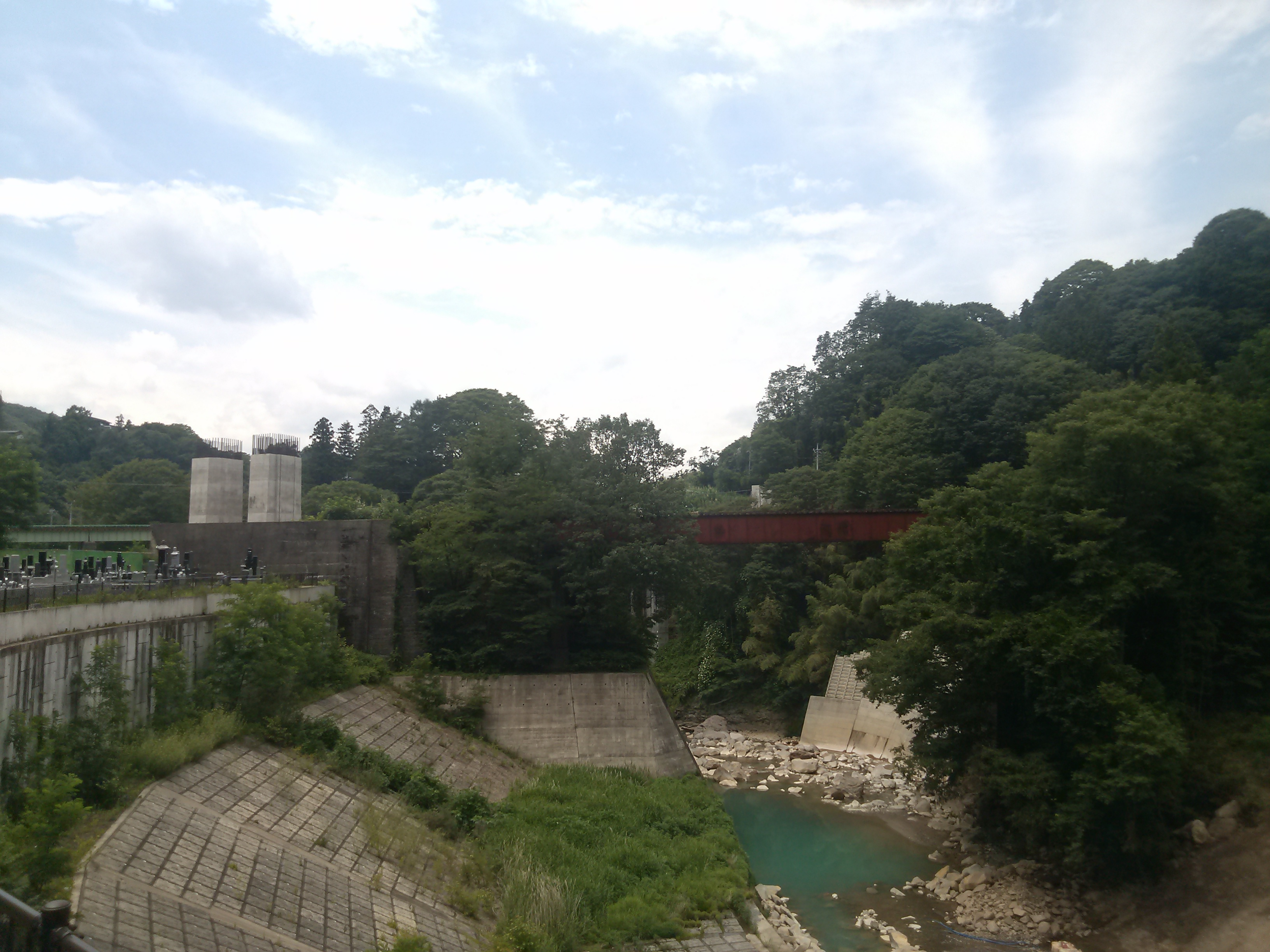 日本鋼管群馬鉄山専用線廃線区間の橋梁